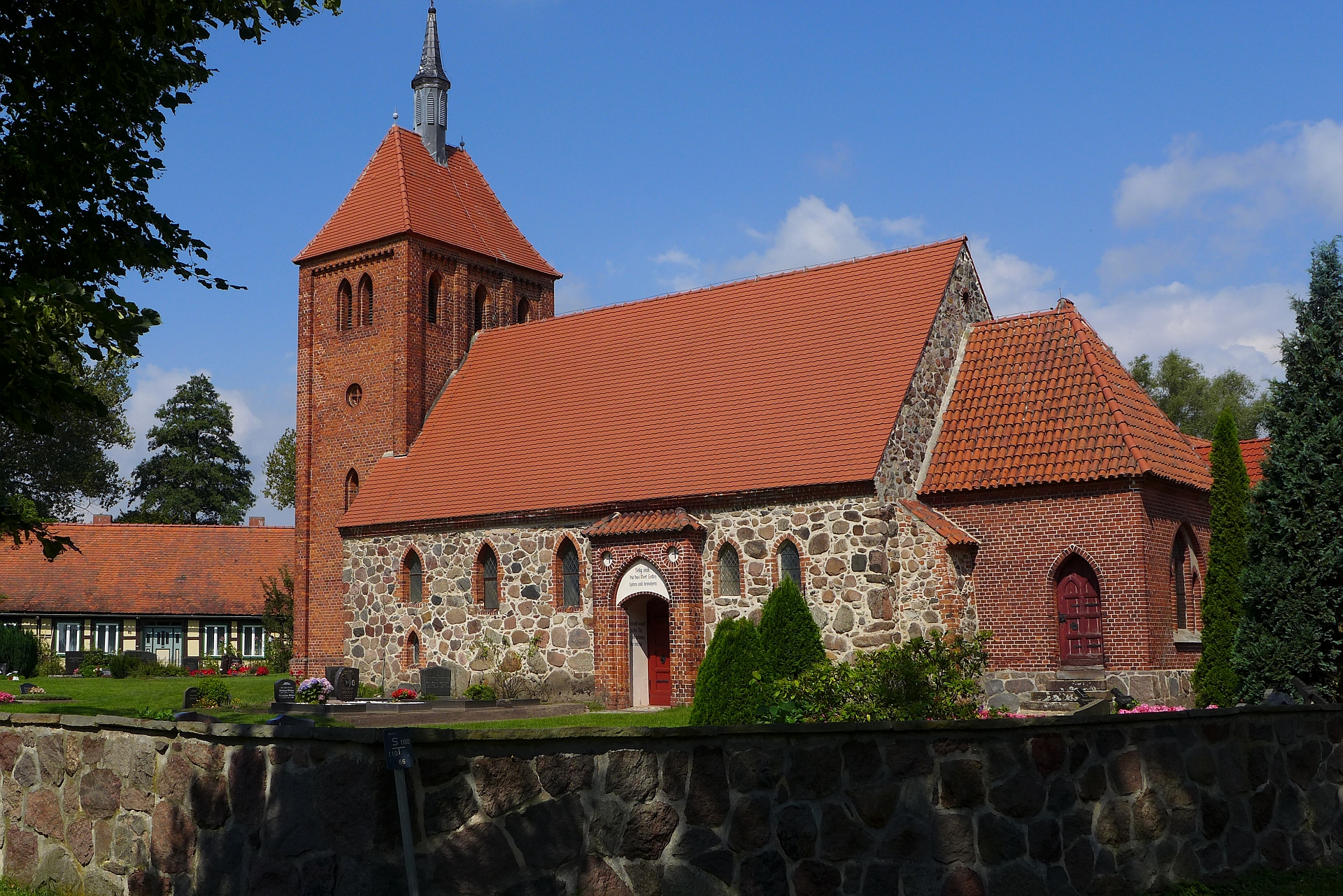 Feldsteinkirche in Mehmke, Ortsteil von Diesdorf, Sachsen-Anhalt. Evangelische Kirche in Mitteldeutschland.